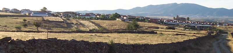 Hinojal, pueblo de la provincia de Caceres / España